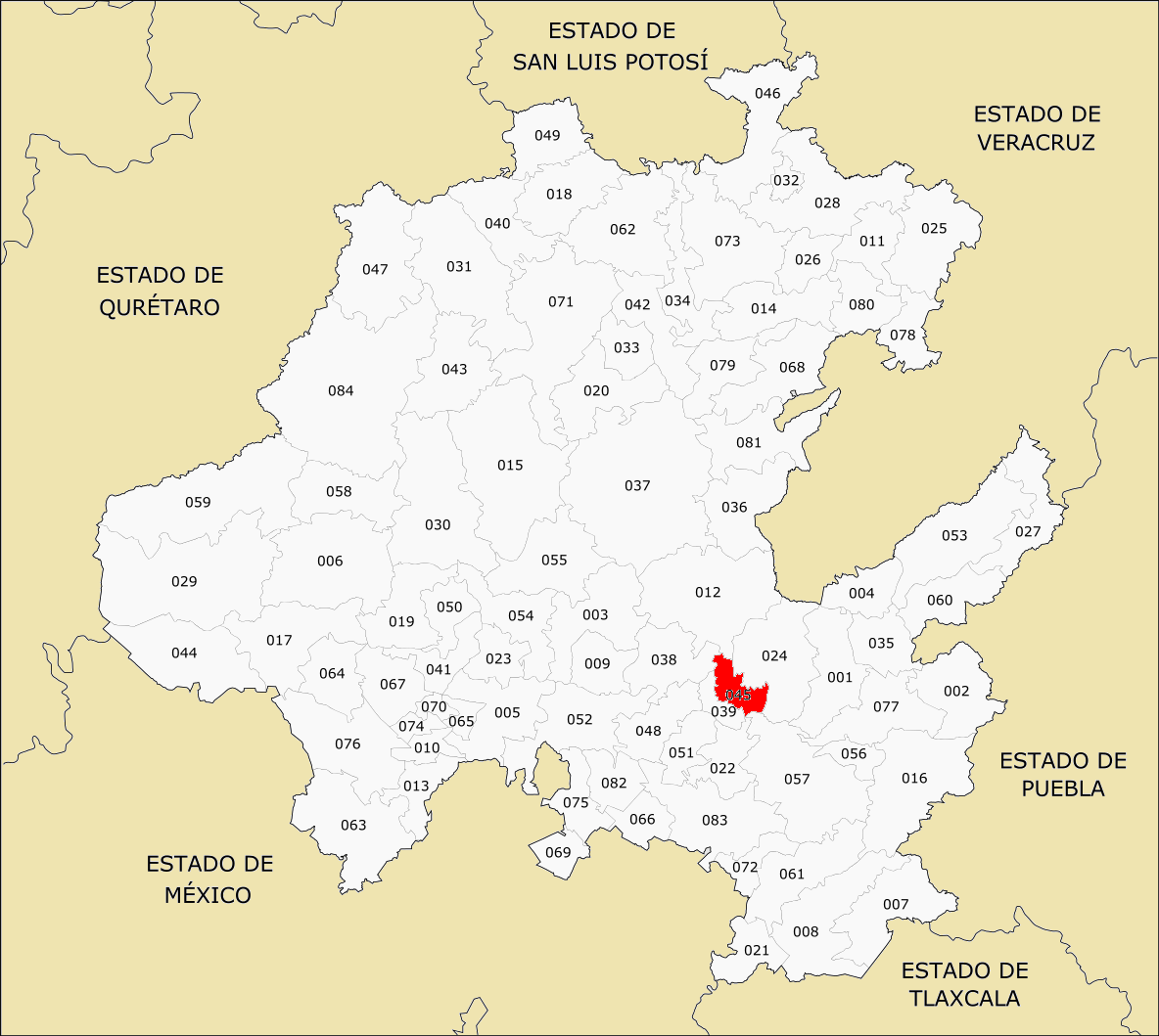 Municipio de Hidalgo